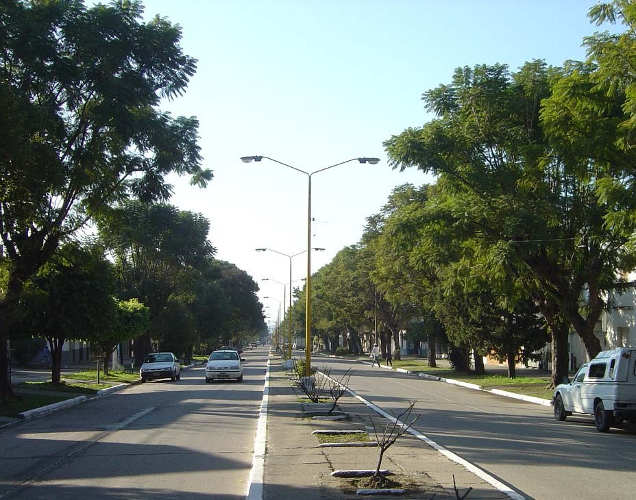 Alem Avenue, Tafí Viejo, Tucumán, Argentina